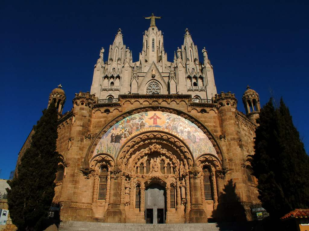 Descripción: Sagrat Cor desde la plaza Fecha: 02/11/2003 Hora: 11:10 Cámara: FinePix 6900Z ISO: 100 Tv: 1/1000 Av: 7 Autor: aTarom